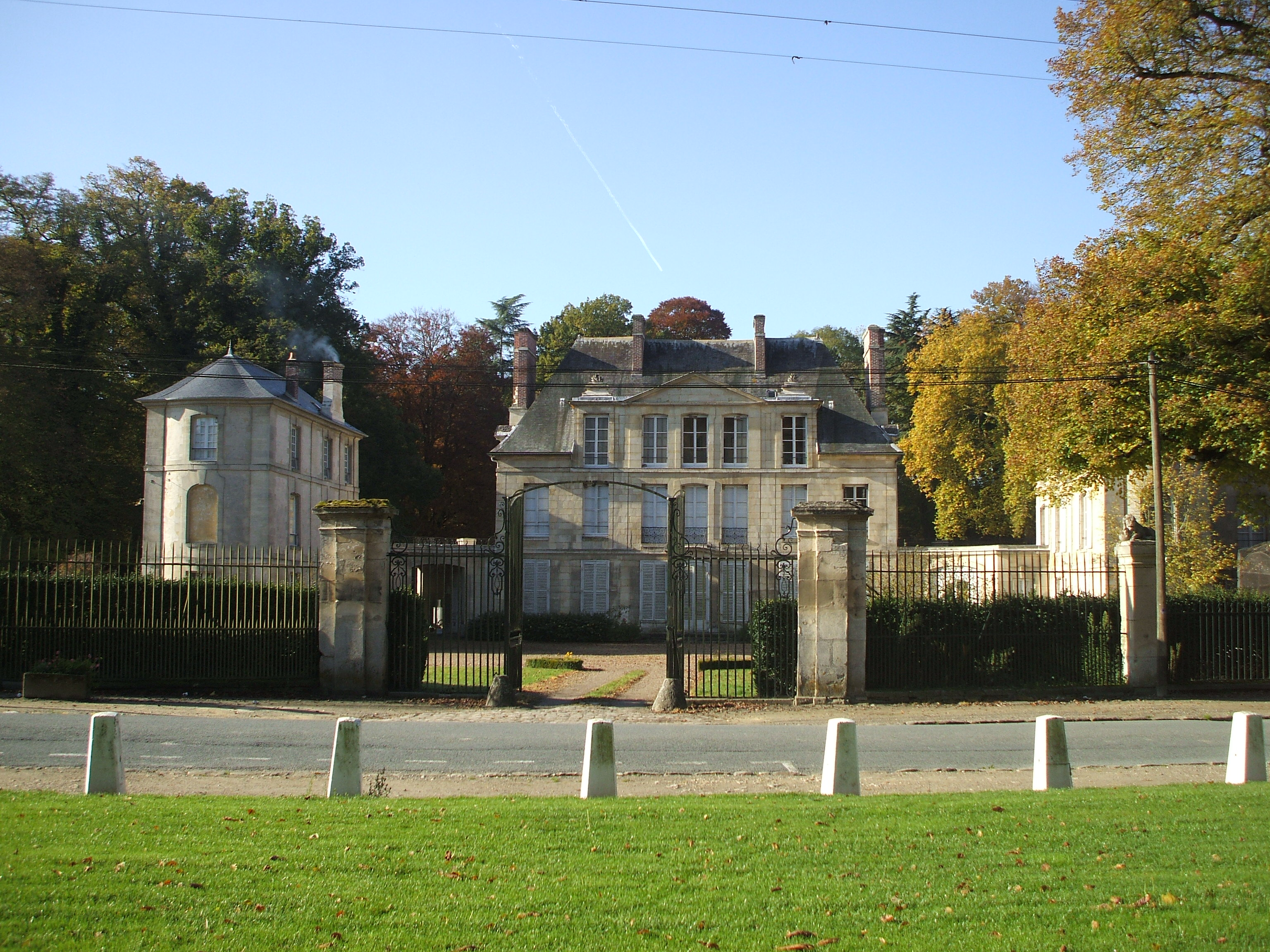 chateau de Puiseux-le-Hauberger oise france